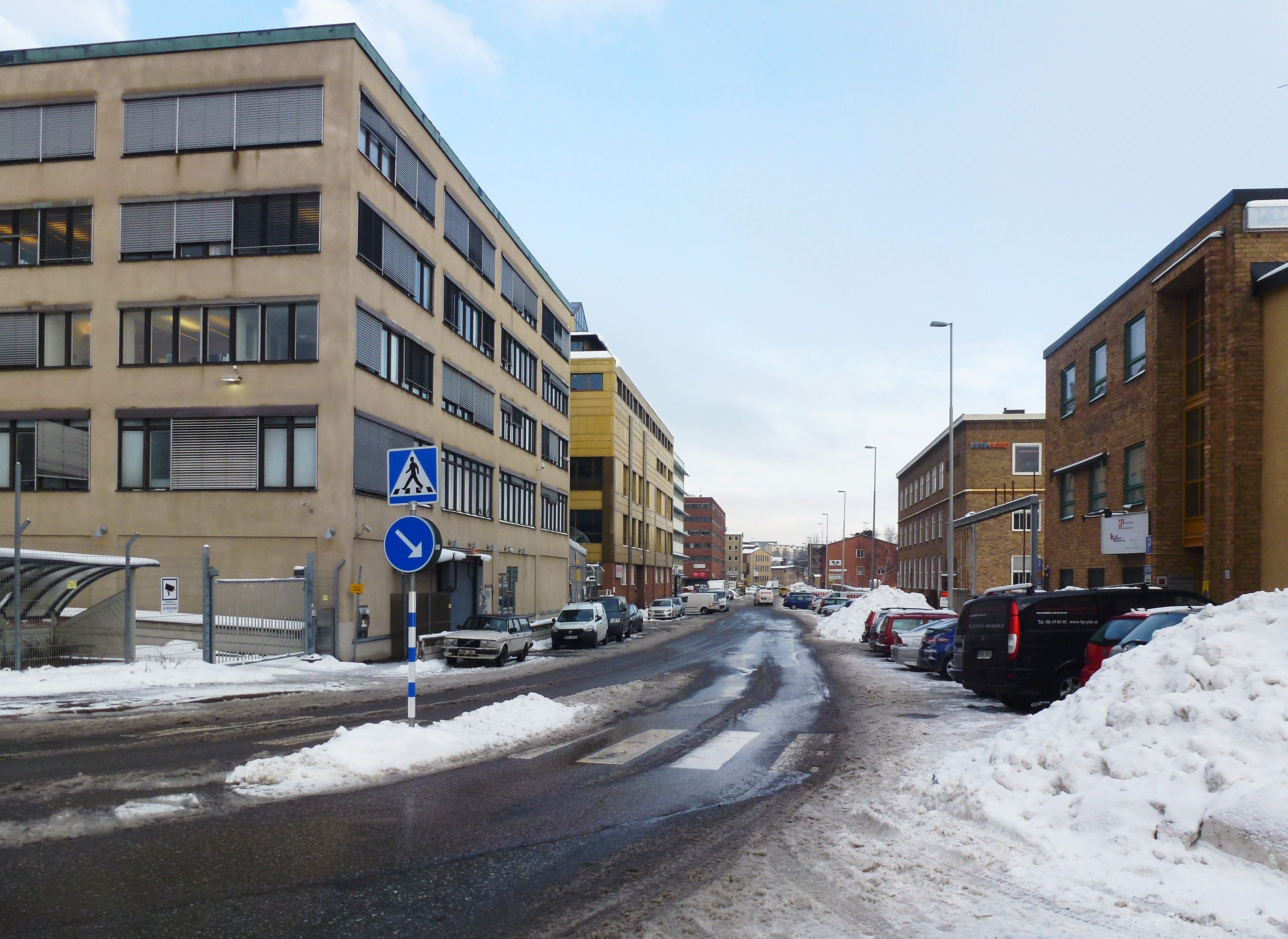 Vretensborgsvägen mot öst